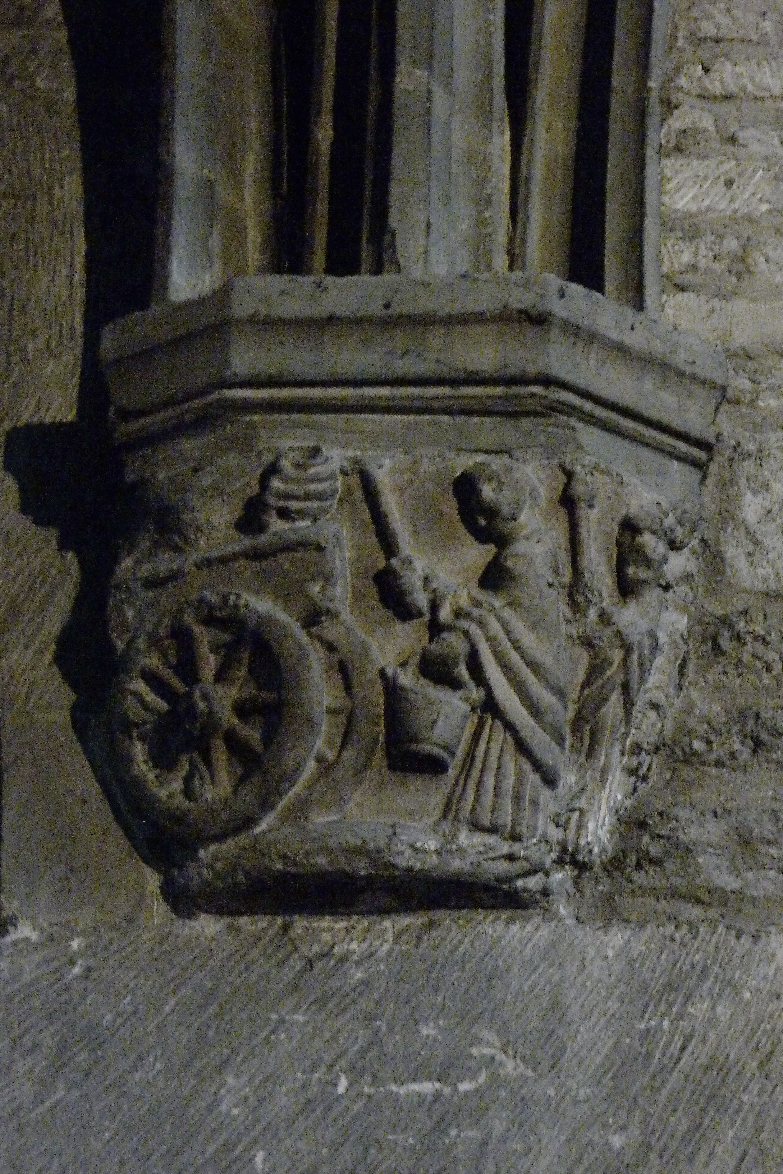 Katholische Kirche Notre-Dame in Deuil-la-Barre, einer Gemeinde im Département Val-d'Oise (Île-de-France), romanisches Kapitell, Darstellung: Überführung der Reliquien des hl. Eugen